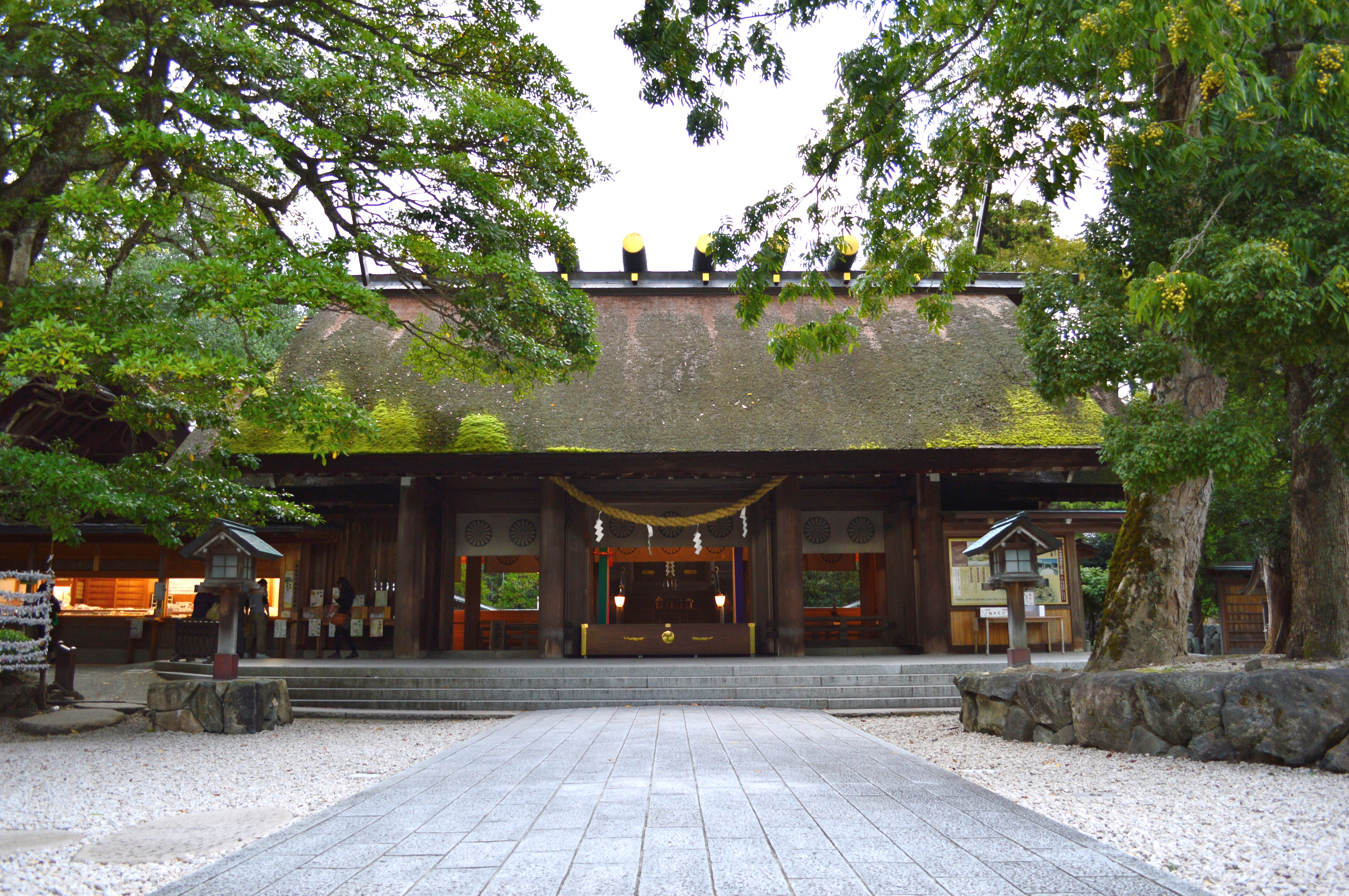 籠神社 拝殿